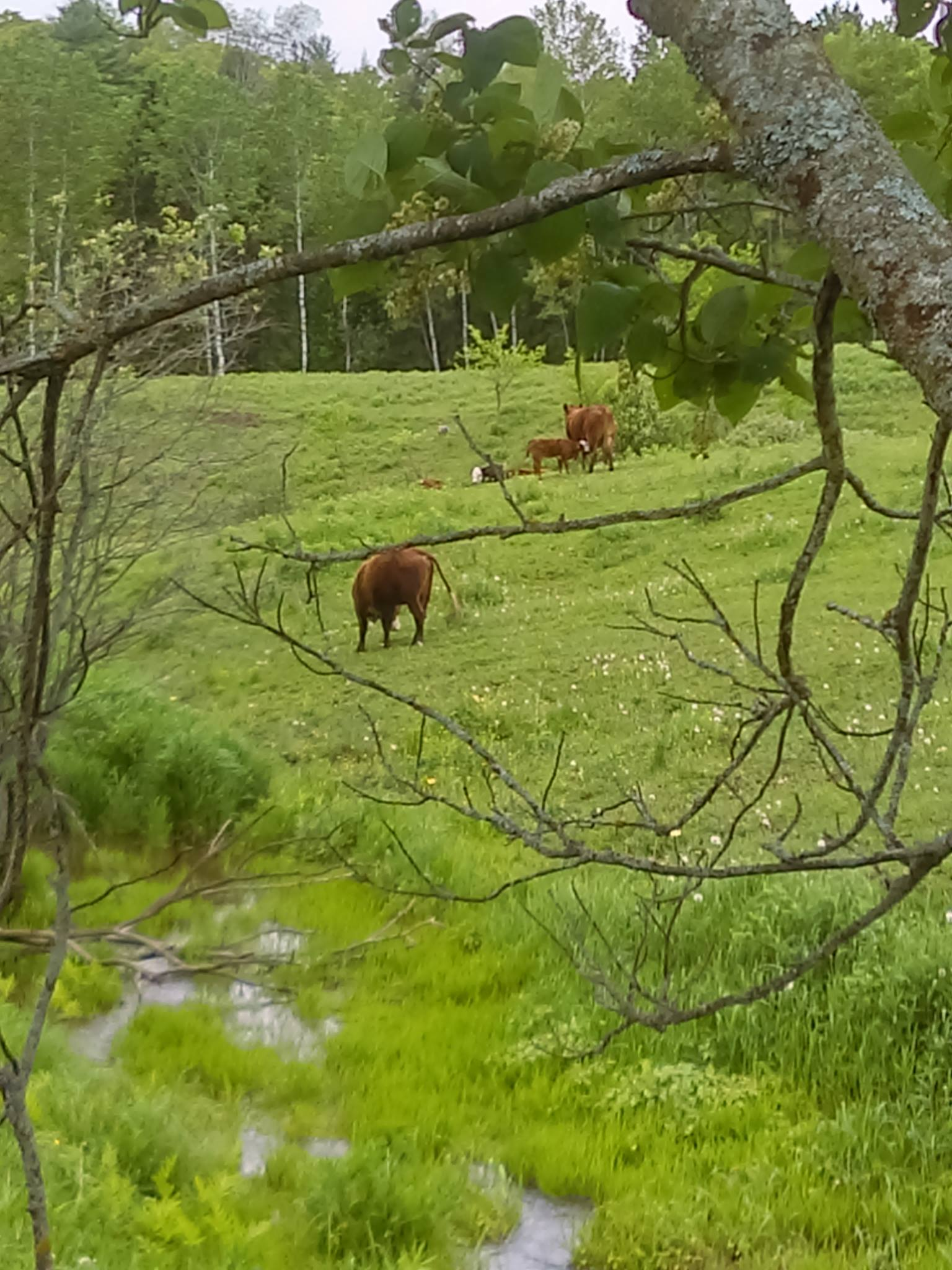 Paturage dans Lanaudière.